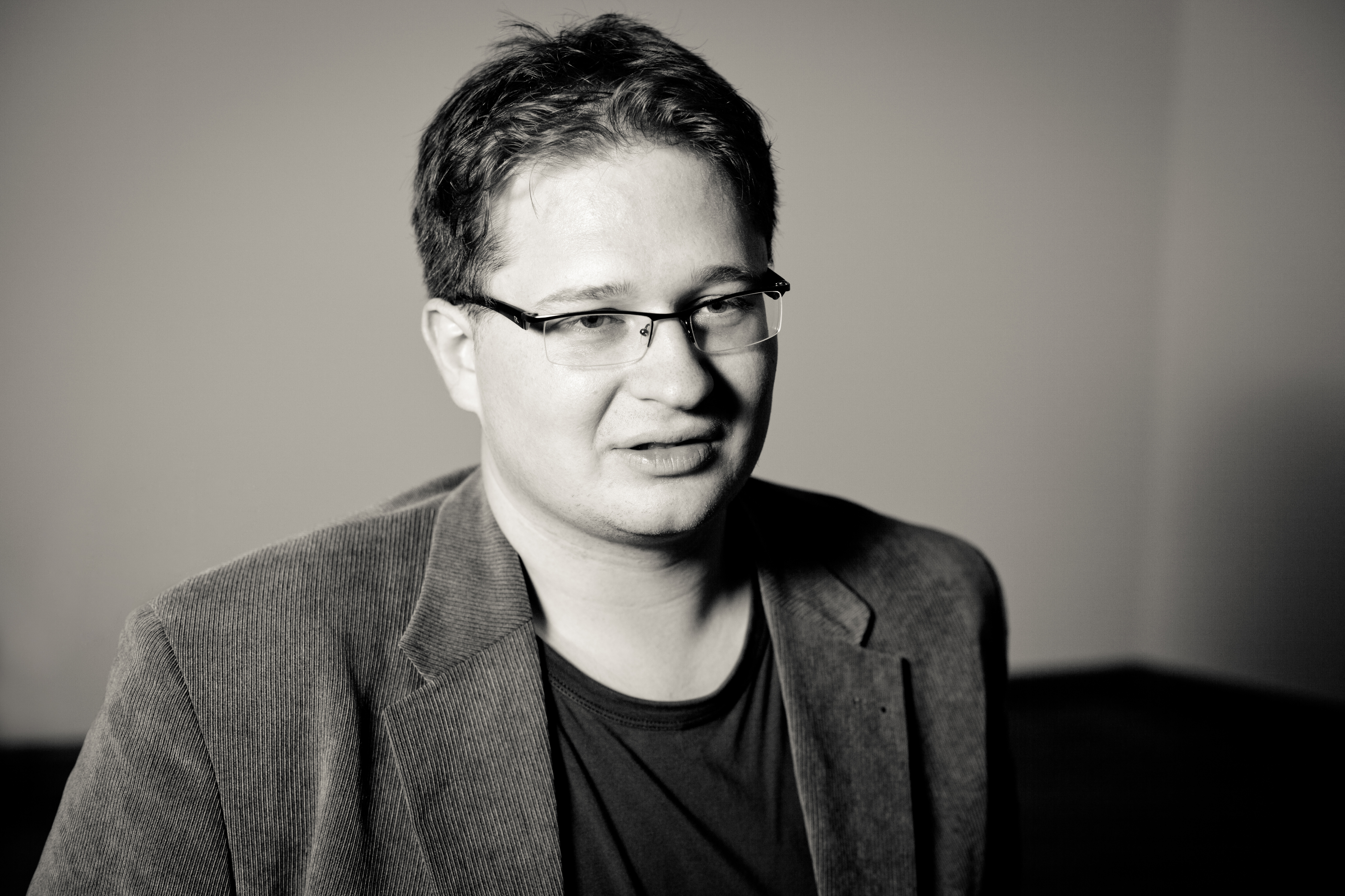 Solti Árpád